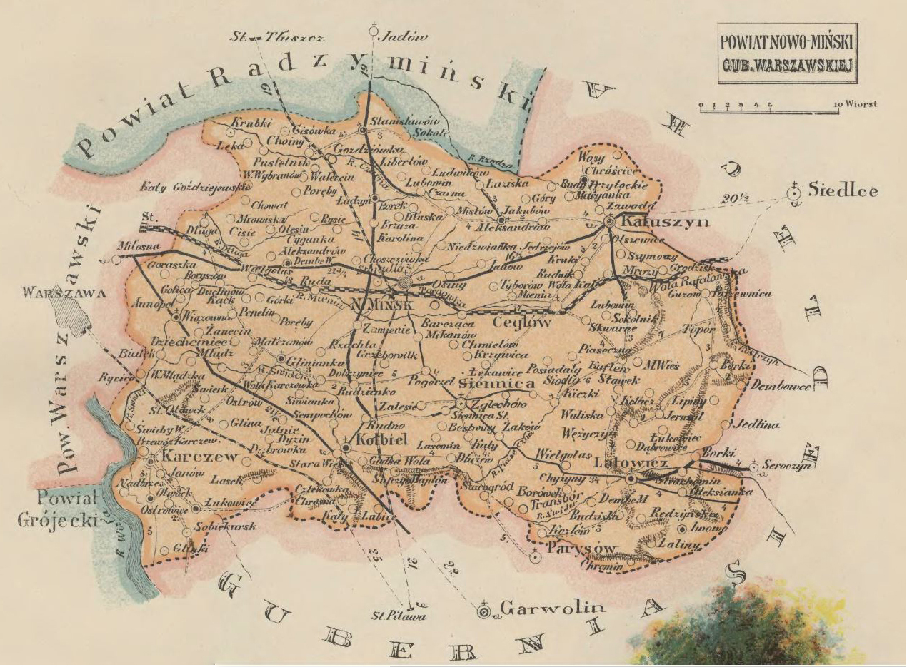 Mapa powiatu nowomińskiego, Atlas geograficzny ilustrowany, 1907.